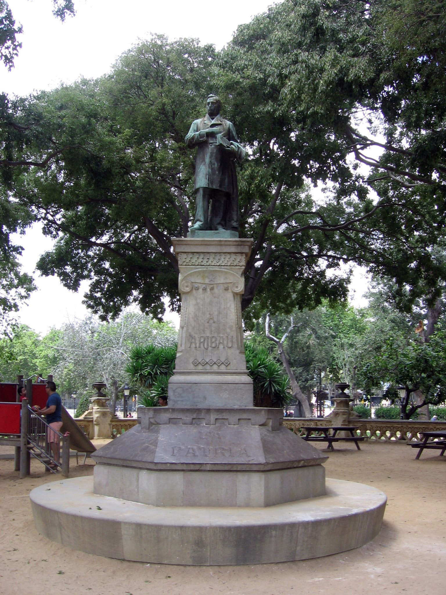 Monumento a Bonaventura Carles Aribau, Parque de la Ciudadela, Barcelona.